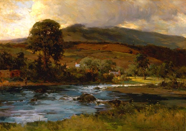 Beaupré.